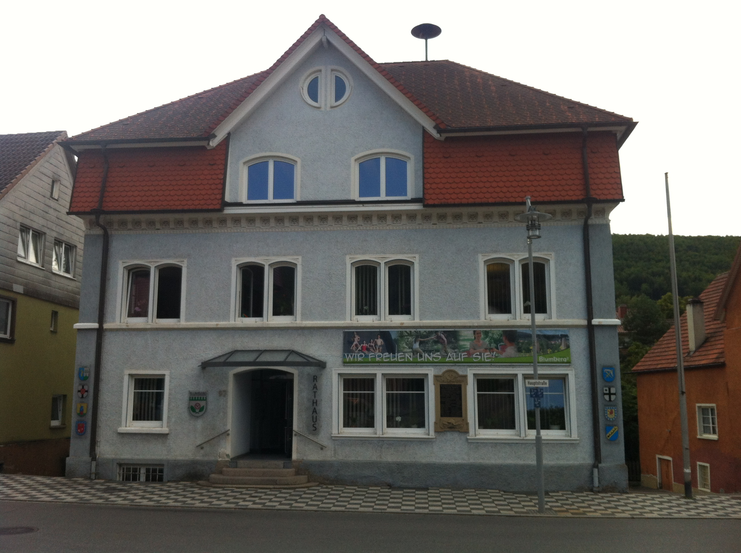 Blumberg, Stadt im Schwarzwald-Baar-Kreis in Baden-Württemberg. Rathaus (Hauptgebäude).